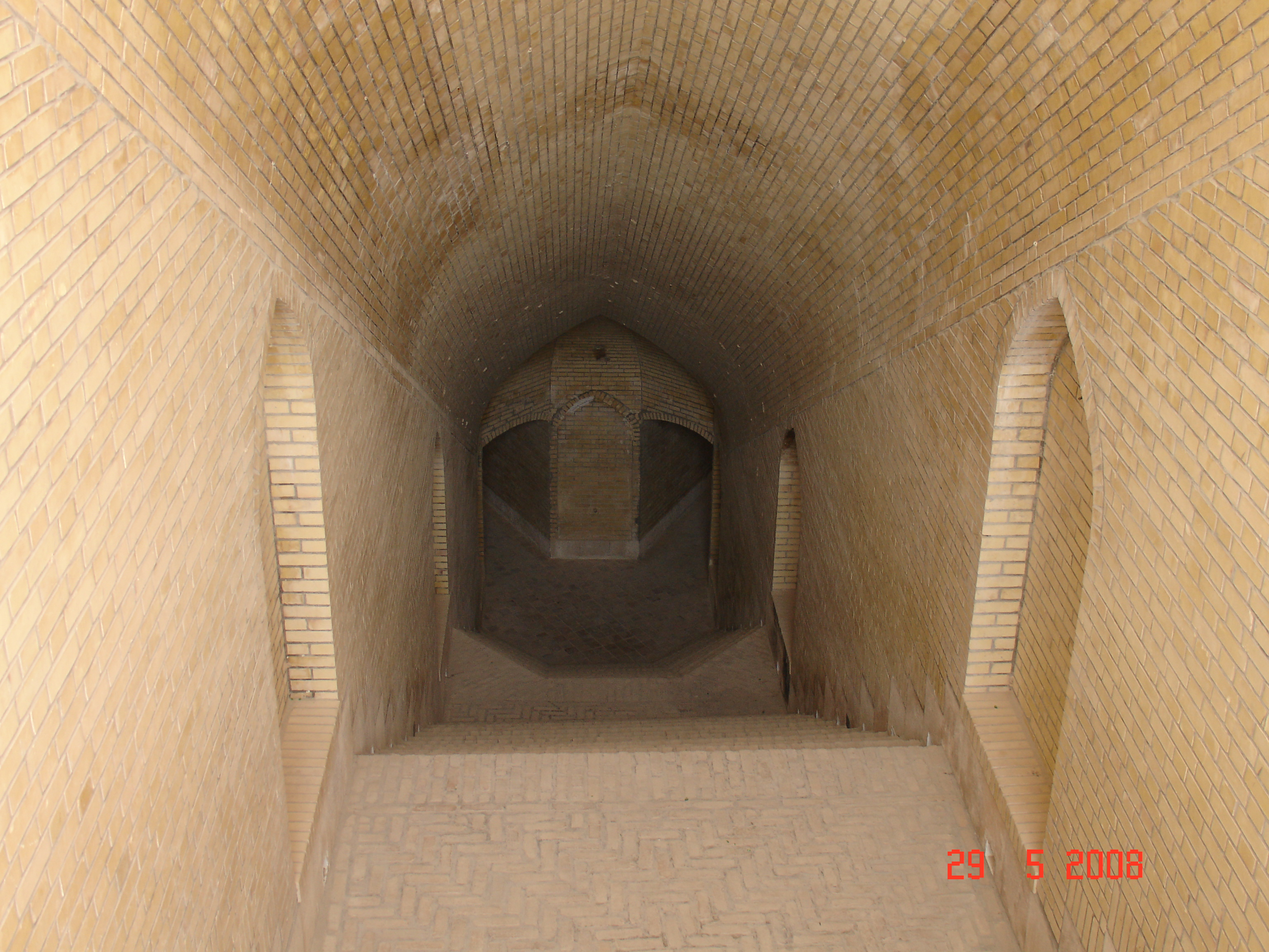 abnbar in kish island